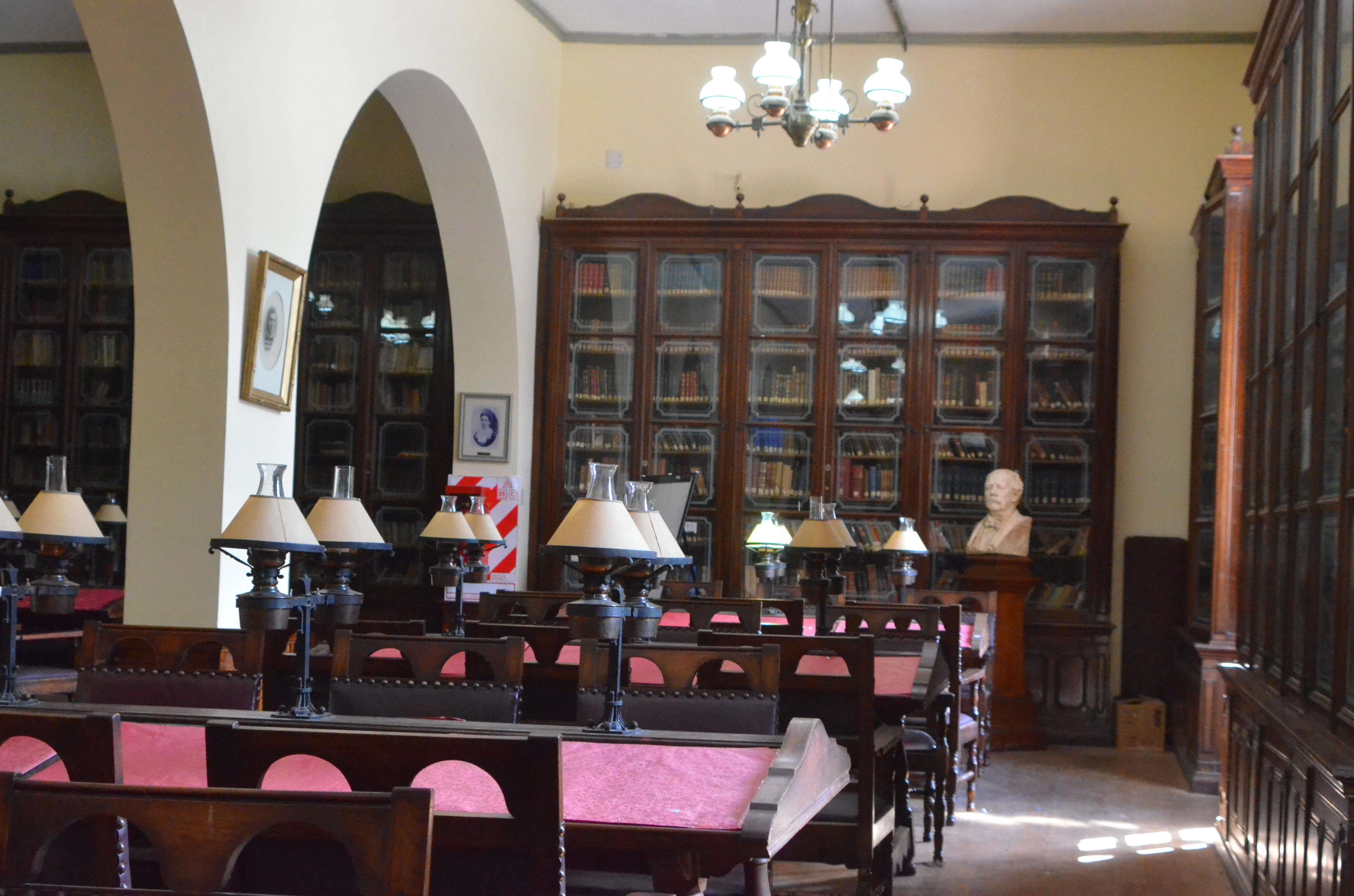 Biblioteca del Colegio Nacional "Justo José de Urquiza" de Concepción del Uruguay, Provincia de Entre Ríos, República Argentina.